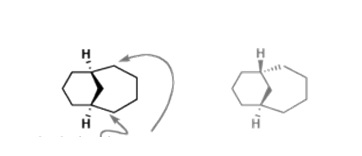 Biciclo em ponte nas forma cis e na menos provável, trans